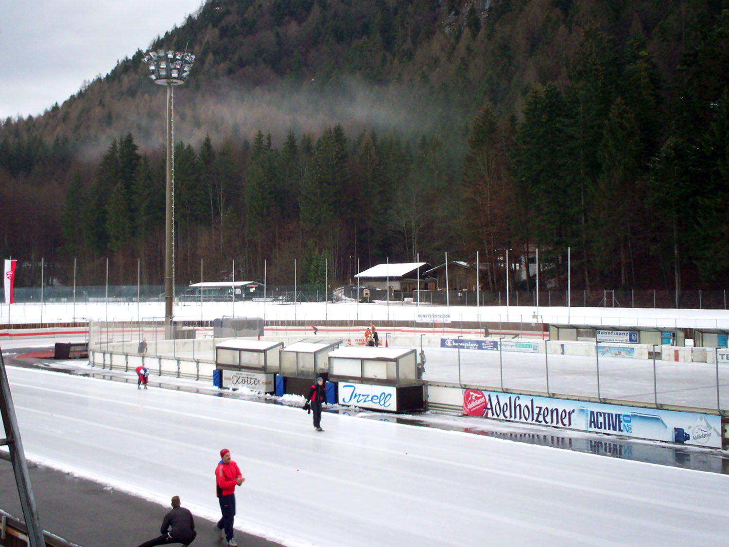 Masters DM 2007 in Inzell (Bayern, Deutschland)